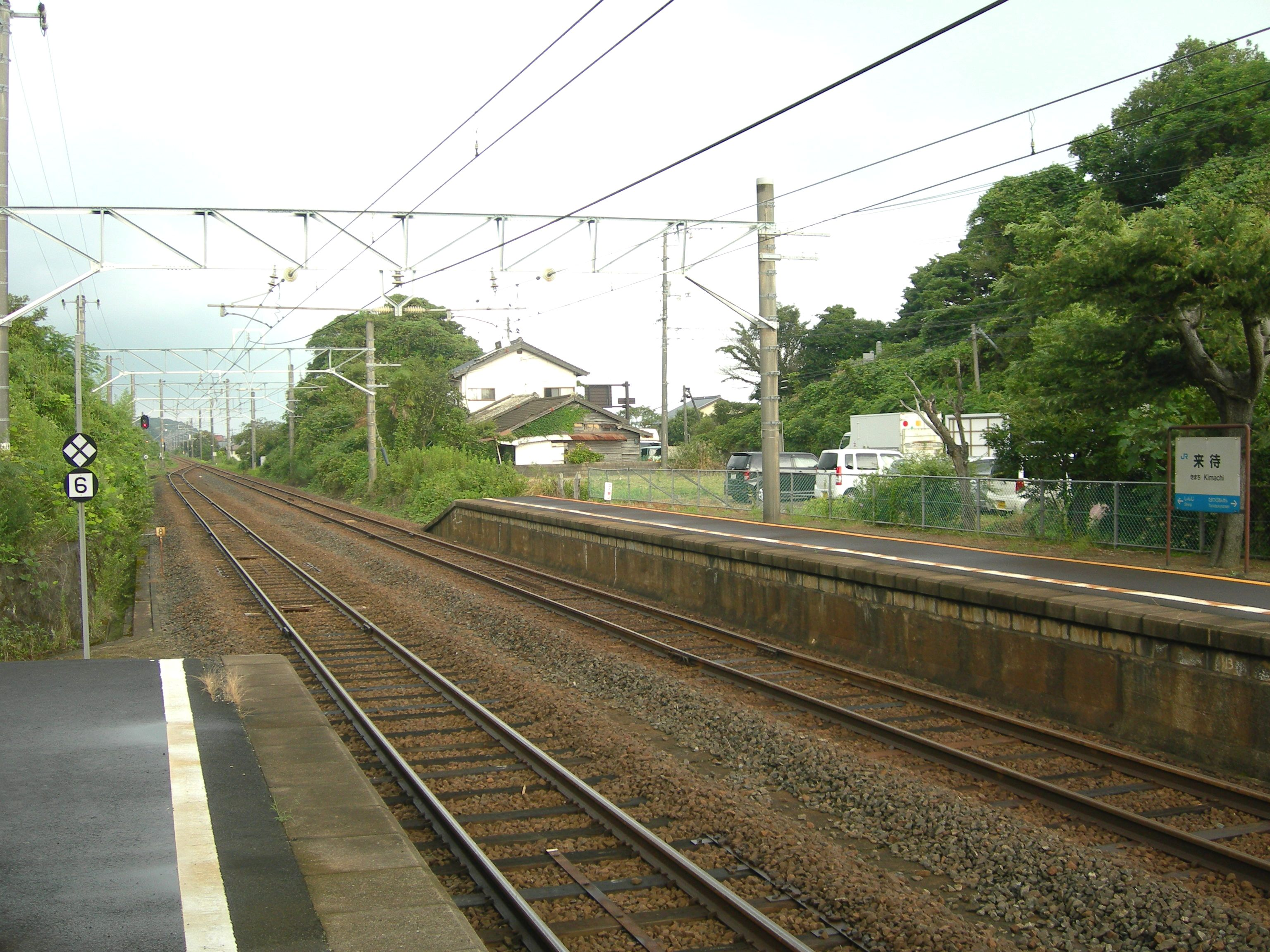 来待駅ホーム